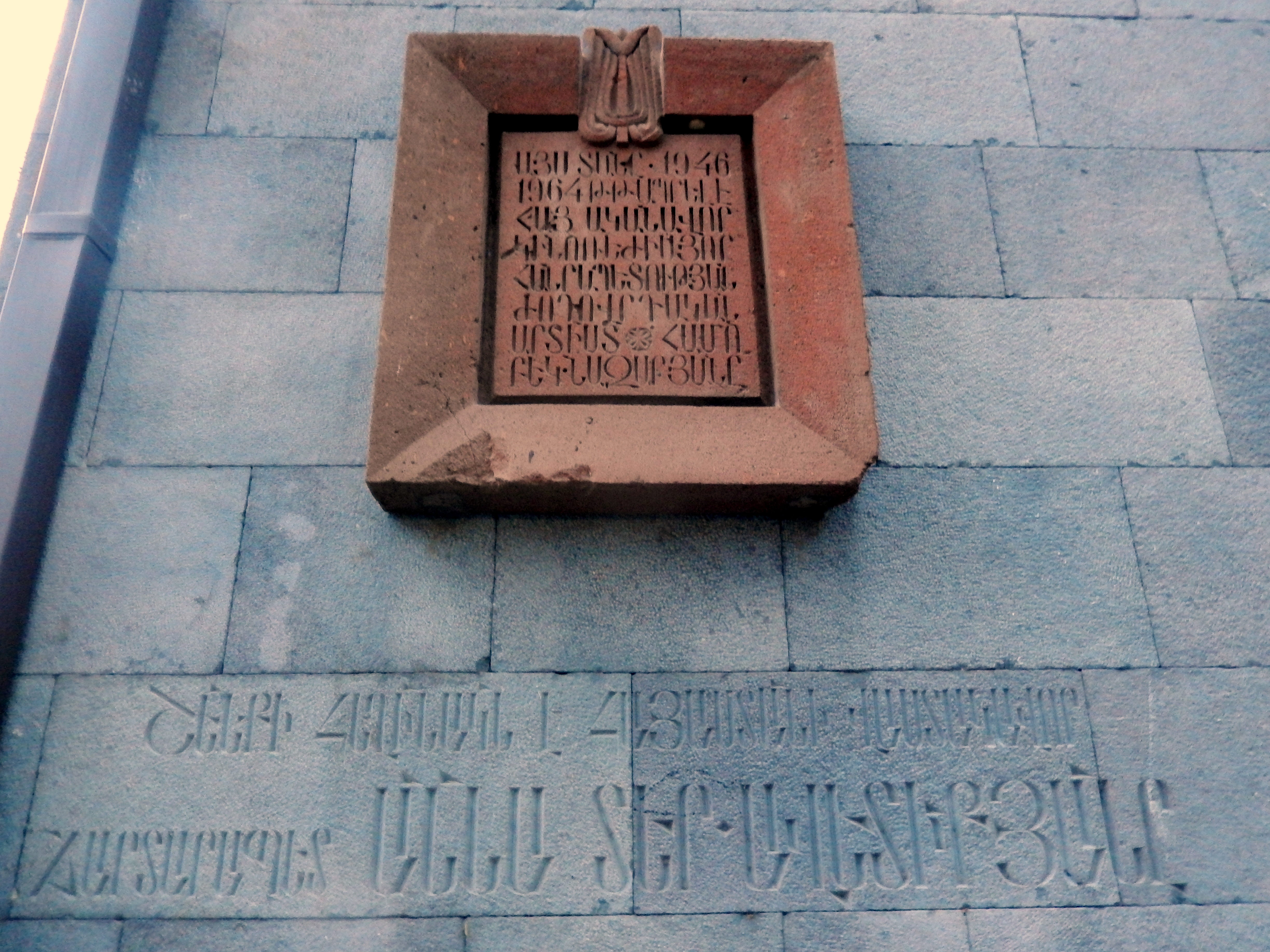 Համո Բեկնազարյանի հուշատախտակըՇենքի հեղինակն է Հայաստանի վաստակավոր ճարտարապետ Աննա Տեր-Ավետիքյանը